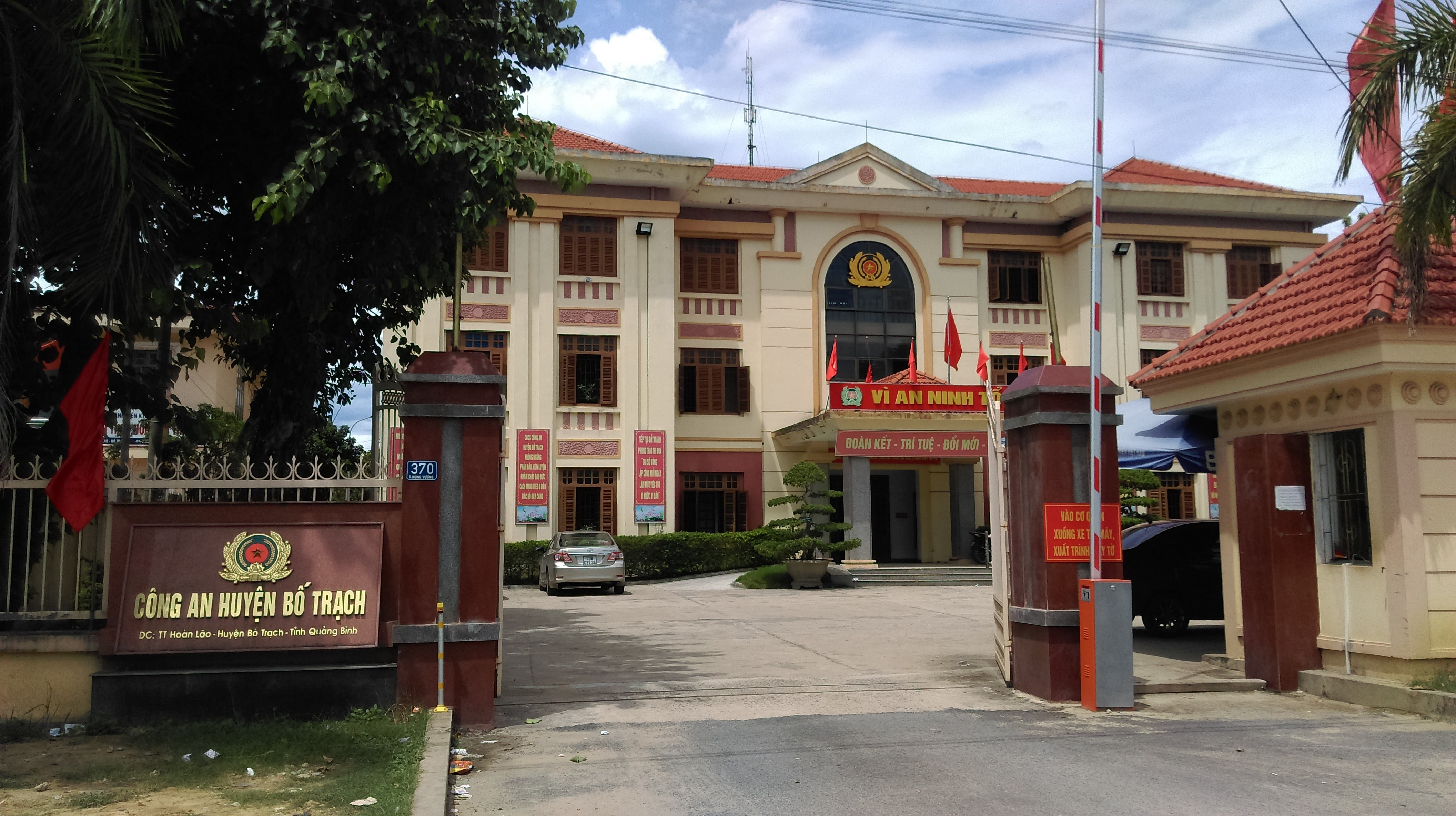 Công an huyện Bố Trạch, Quảng Bình